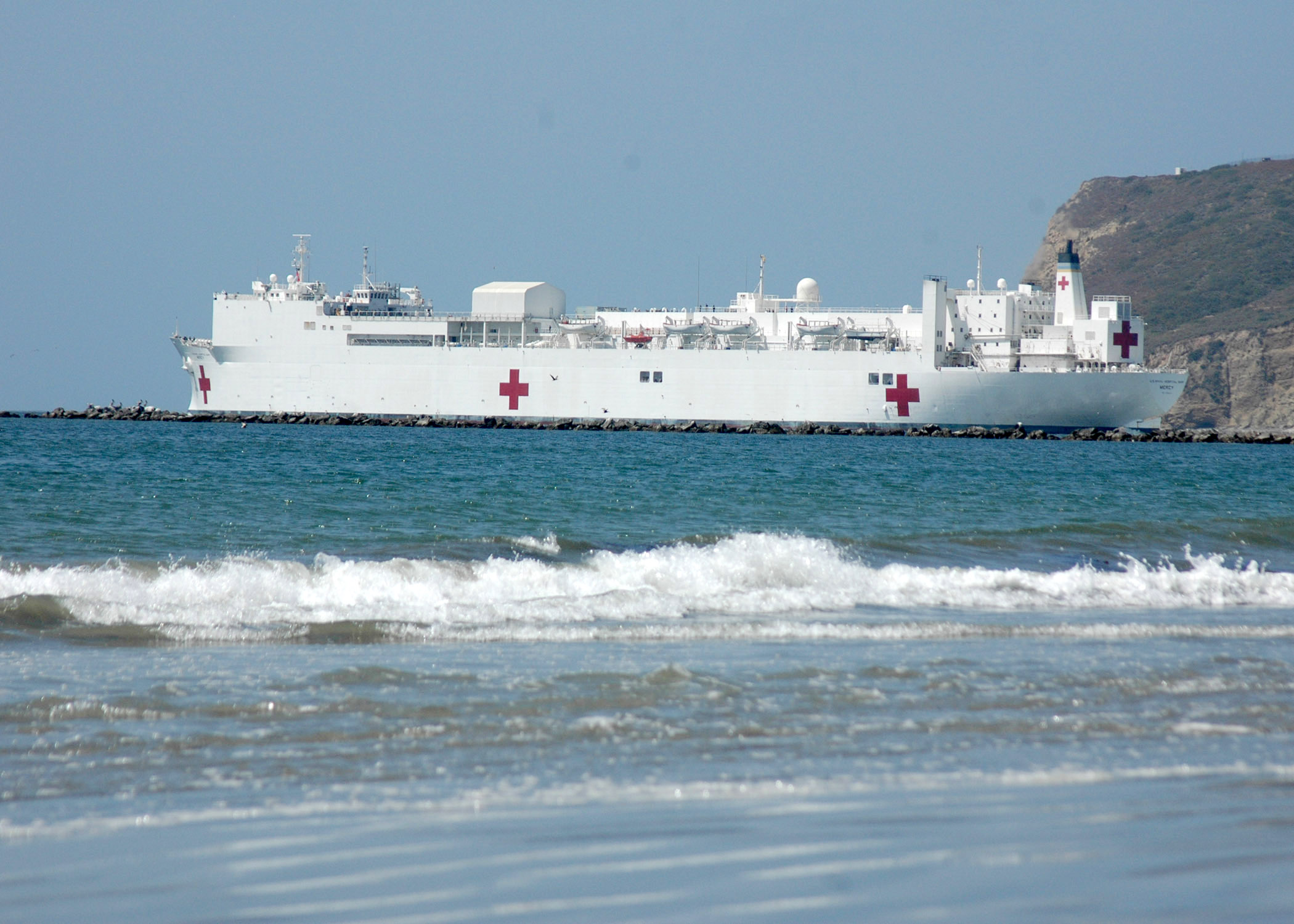 USNS Mercy (T-AH-19) departing San Diego Bay